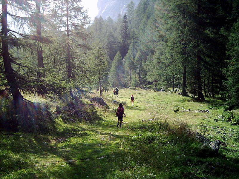 Karnische Alpen, Val Fleons